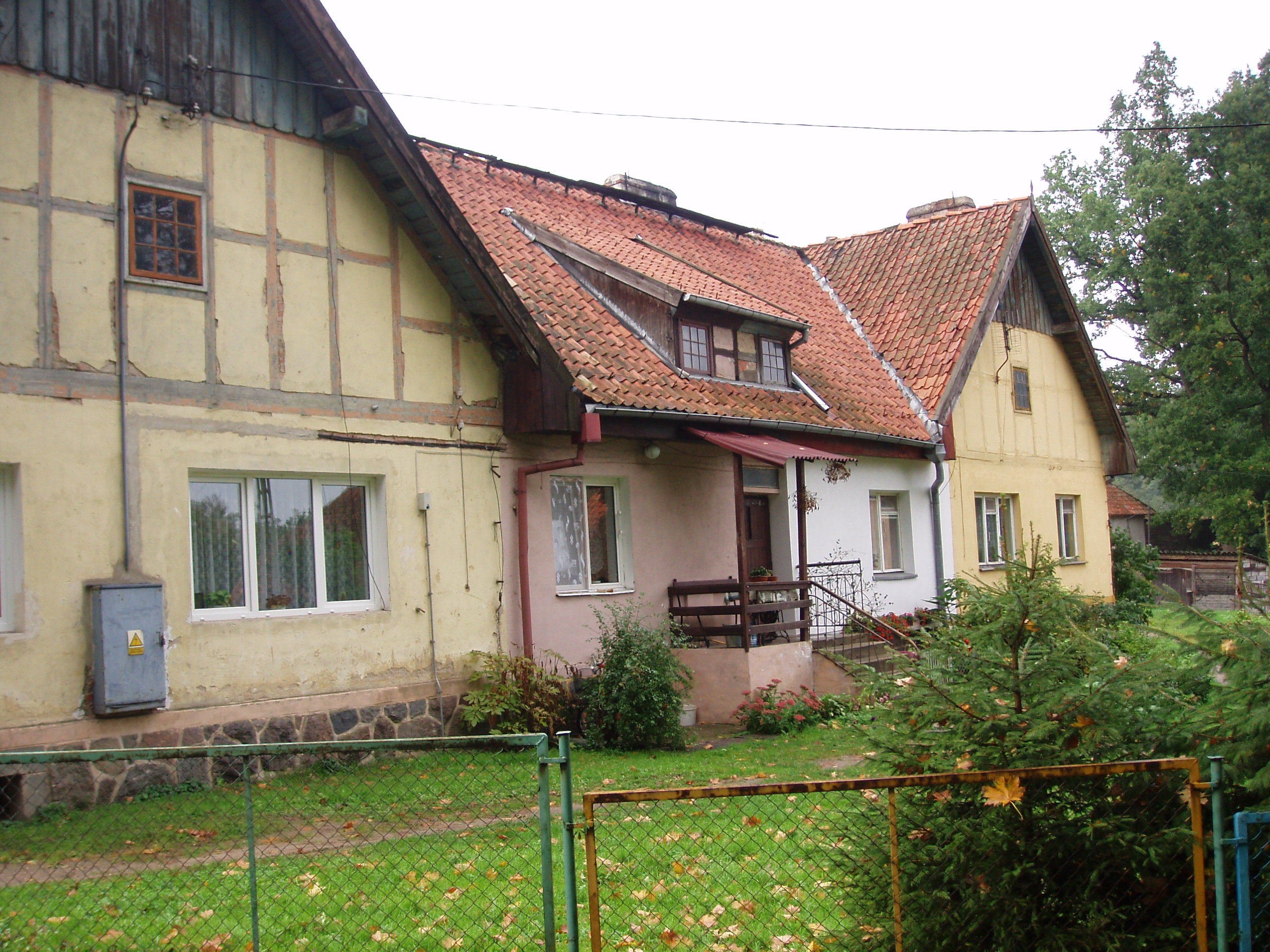 Łężany, zabudowania obok pałacu